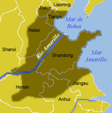 Mapa de la Llanura del Norte de China